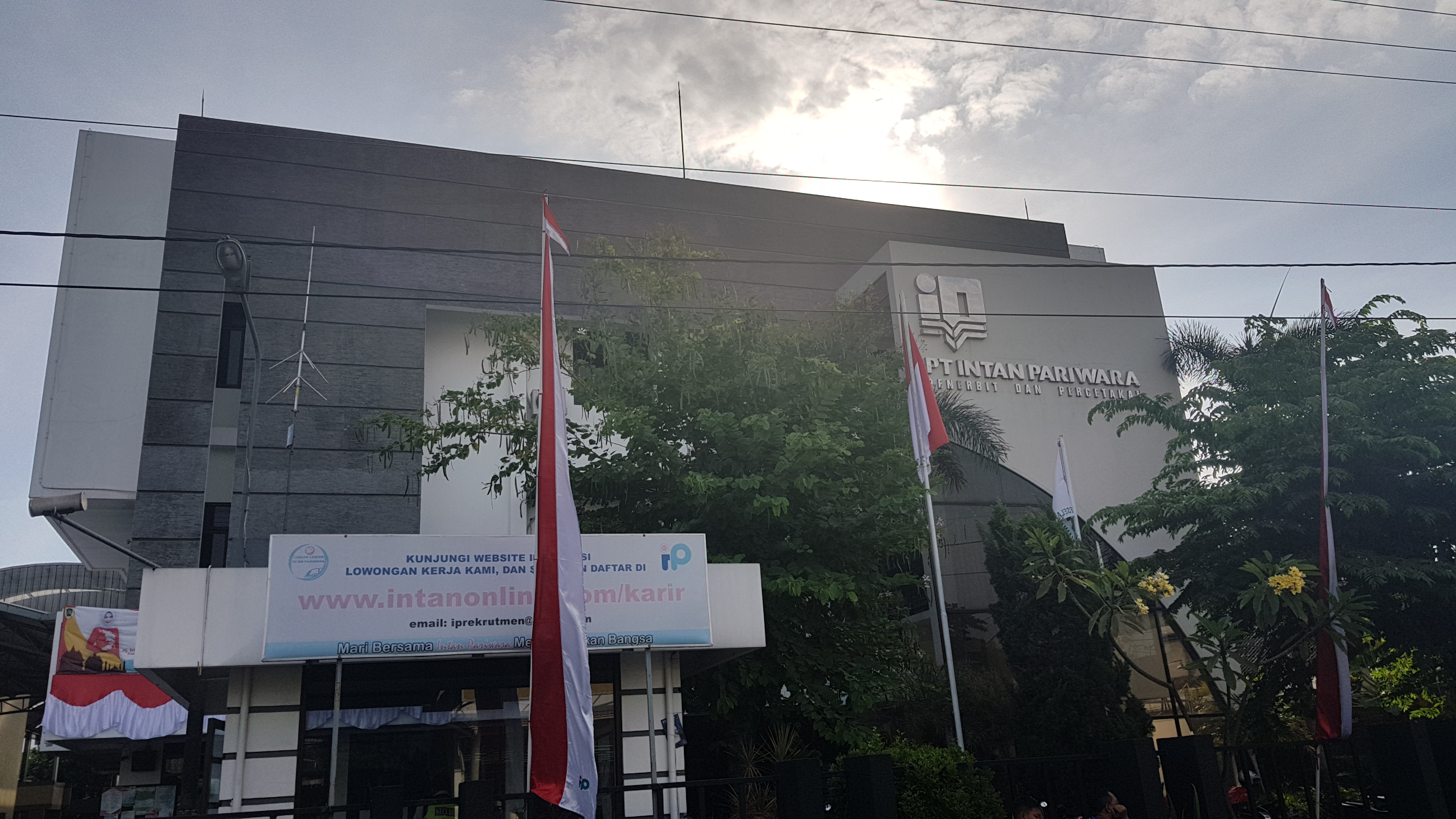 perusahaan